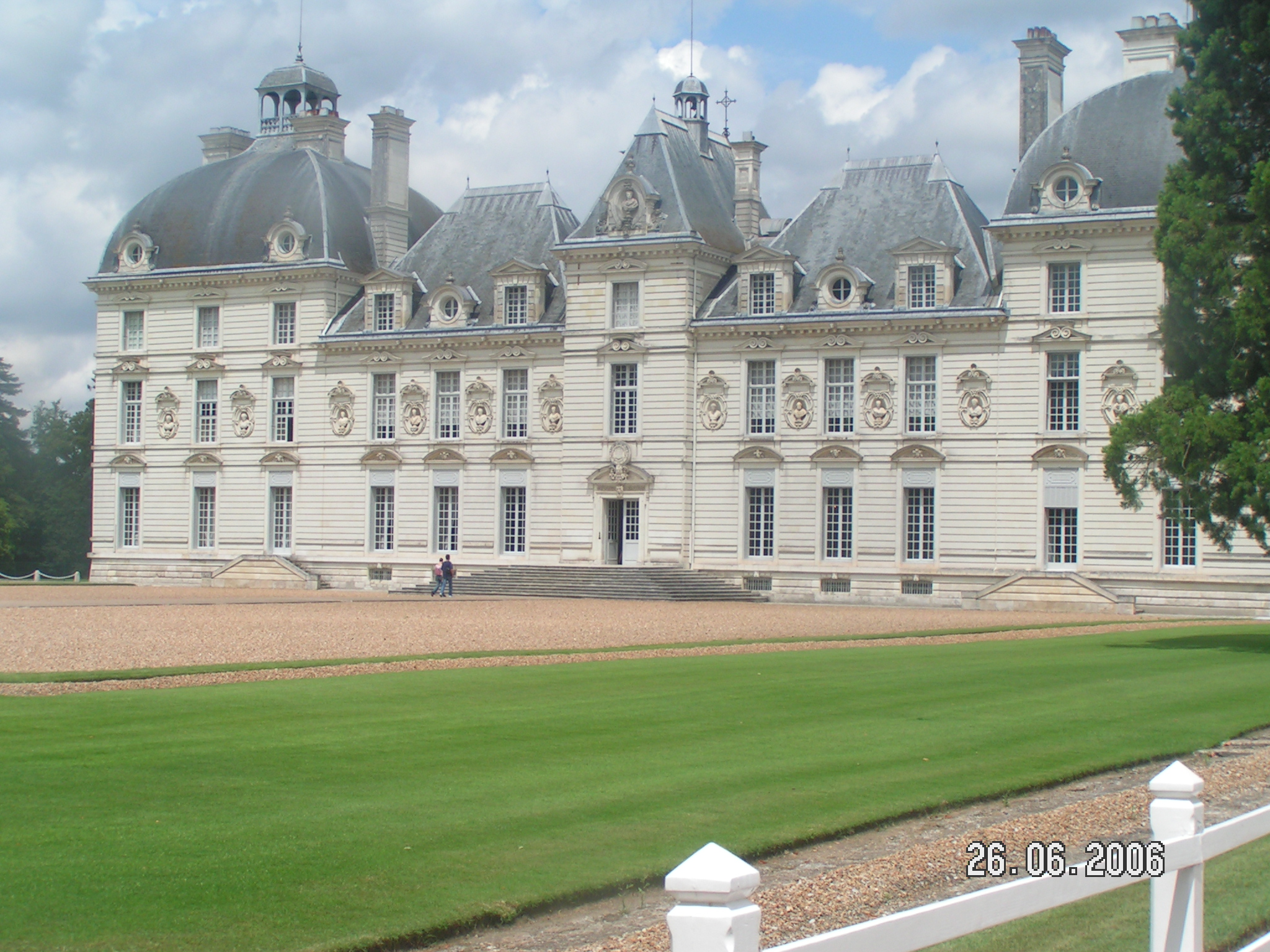 château de Tintin - Cheverny - France